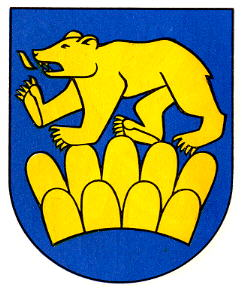 Wappen von Schoenholzerswilen